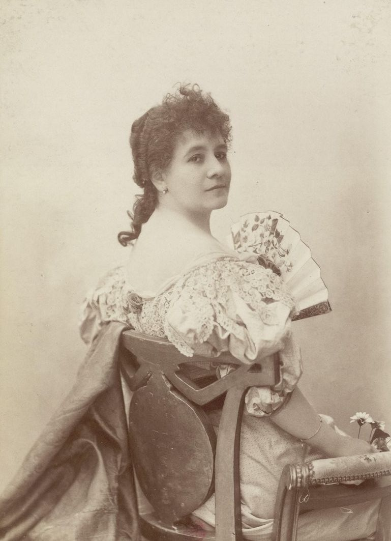 Photo de la mezzo-soprano Esther Chevalier, par l'atelier Nadar